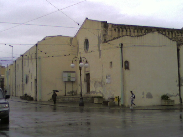 Foto personale scattata, Lunedì 24 settembre 2007 con cellulare Samsung SGH-Z230, raffigurante la chiesa di Sant'Agata a Quartu Sant'Elena